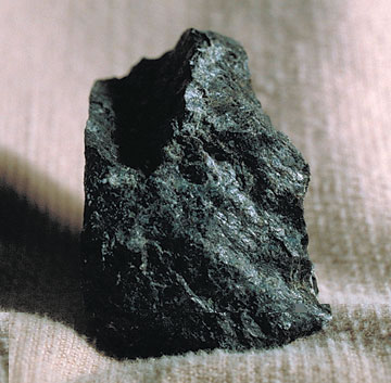 Serpentine